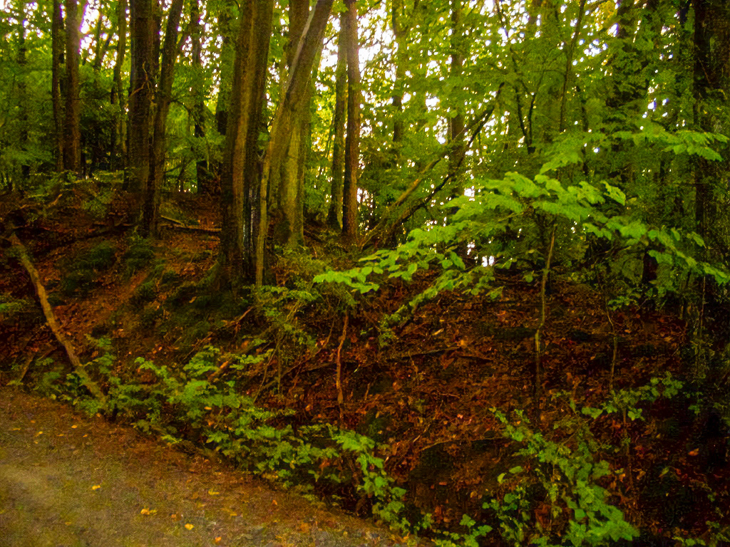 Abraumhalde unterhalt der Schachtpinge, Mittelalter